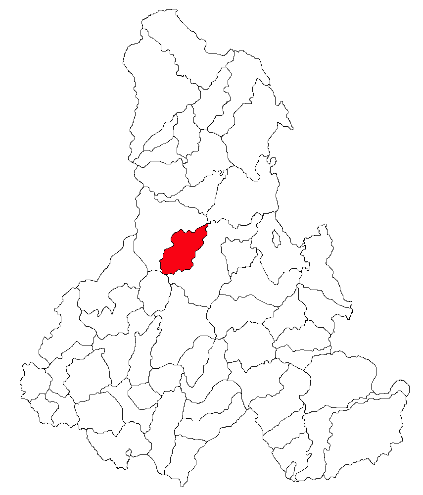 Categorie:Hărţi ale judeţului Harghita Sursă ro::Imagine:Harta_jud_Harghita.png